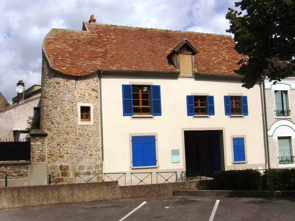 Ferme des Tournelles, résidence de Jean de La Bruyère, médiathèque, Saulx-les-Chartreux (91)